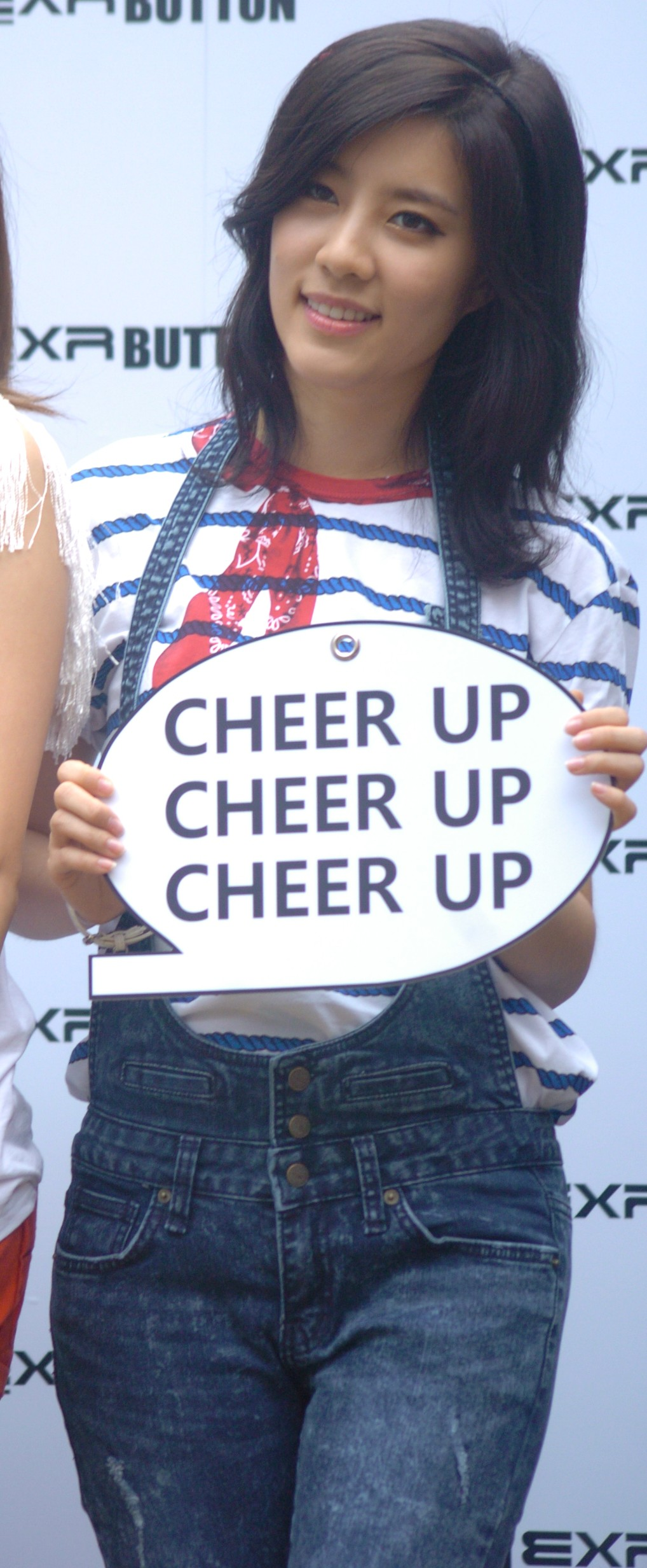 EXR 푸시버튼과 콜라보레이션 런칭10주년